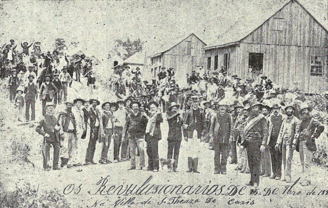 Líderes da Revolta dos Colonos de 26 de novembro - 14 de dezembro de 1891, em Caxias do Sul. No primeiro plano, ao centro, de farda, o delegado de polícia Francisco Januário Salerno, e à extrema direita, com uma faixa ao peito, o chefe dos revoltosos, Affonso Amabile.